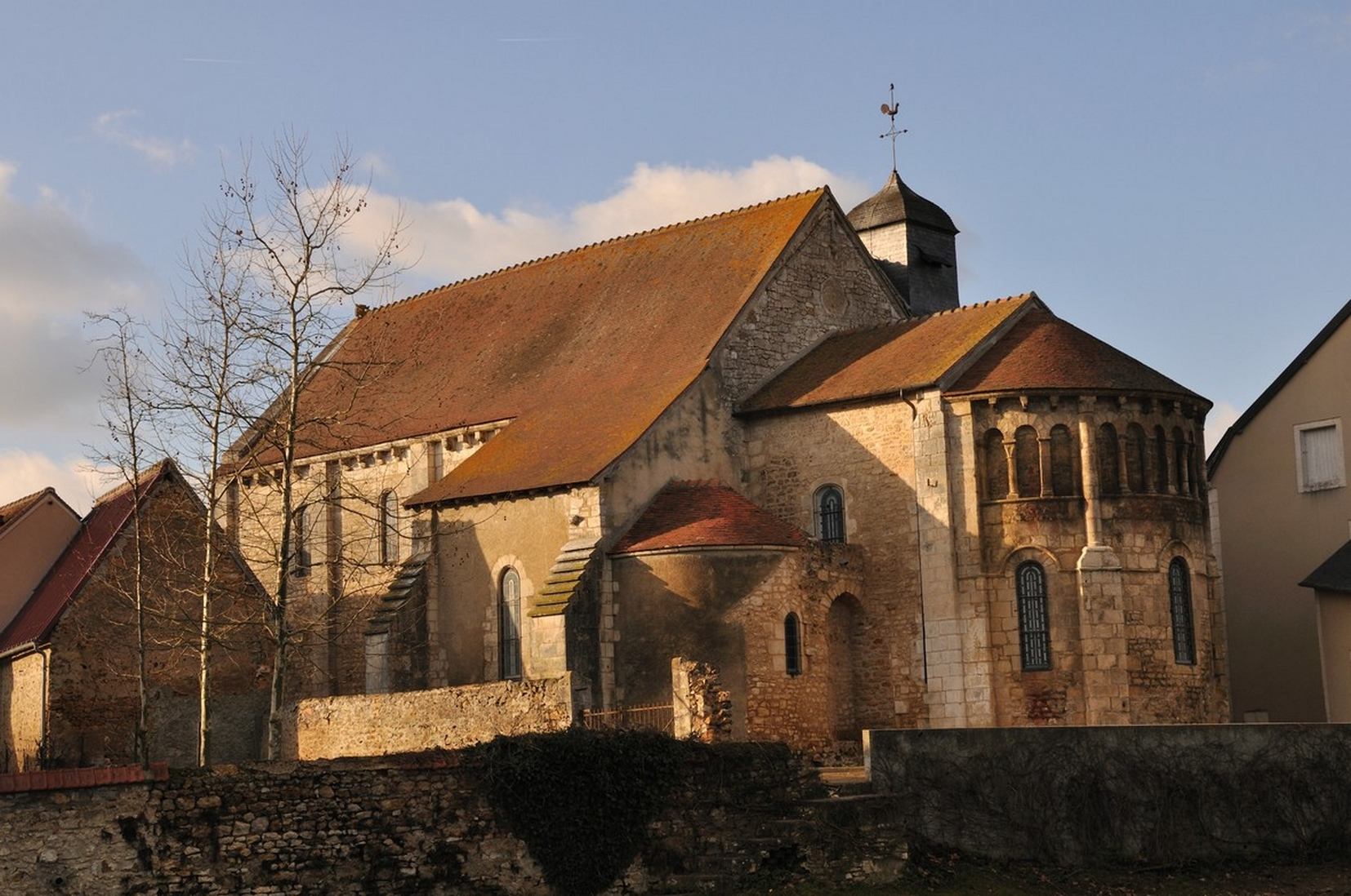 Eglise Saint-Martin - Ardentes (Indre)